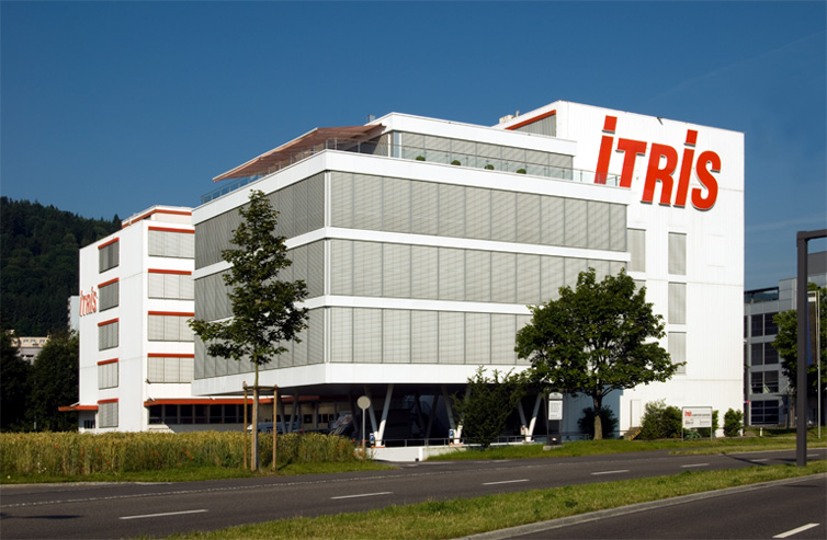 ITRIS Gebäude des Hauptsitz in Spreitenbach